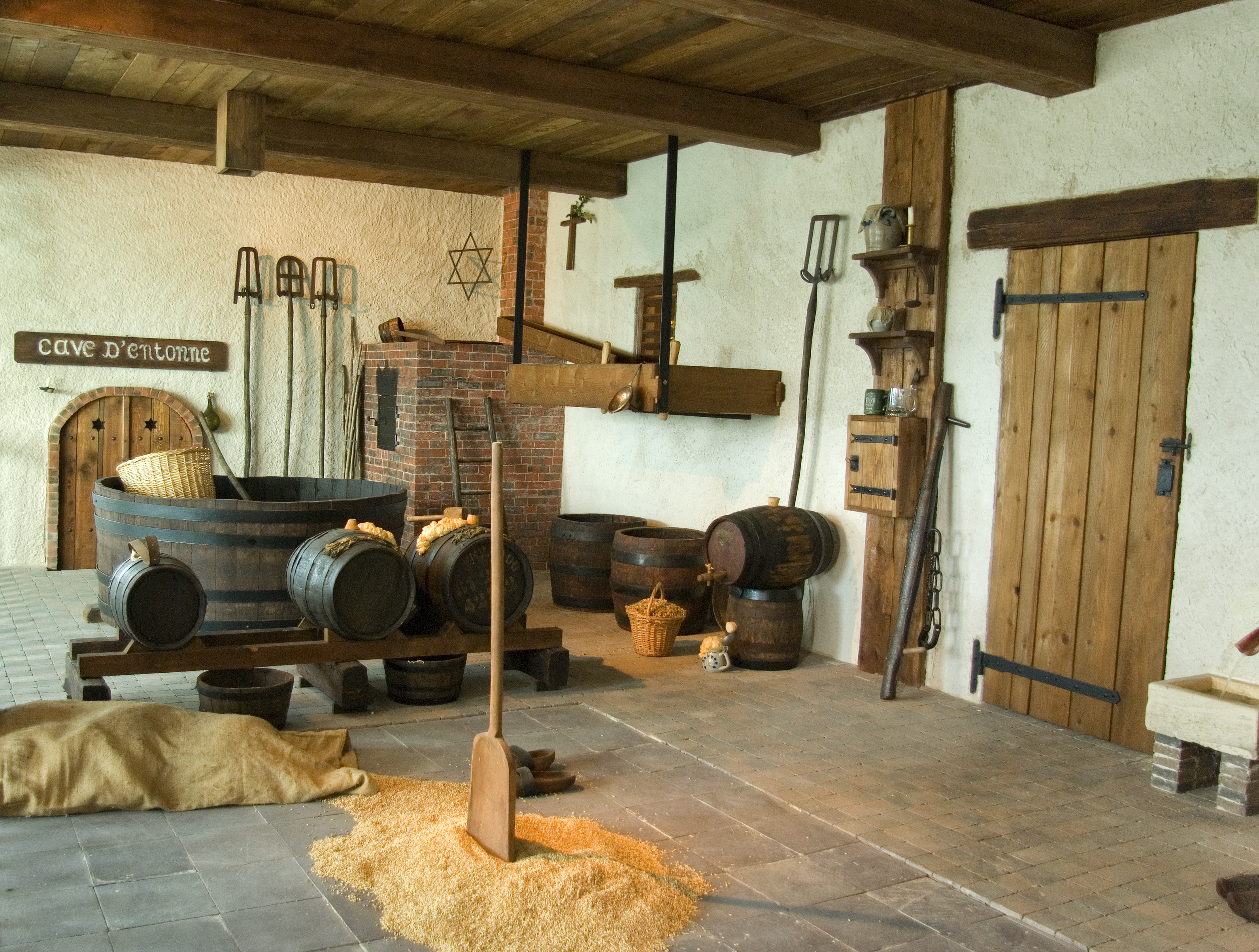 Vus genéral de la reconstitution de la brasserie 18ieme du Musée français de la brasserie